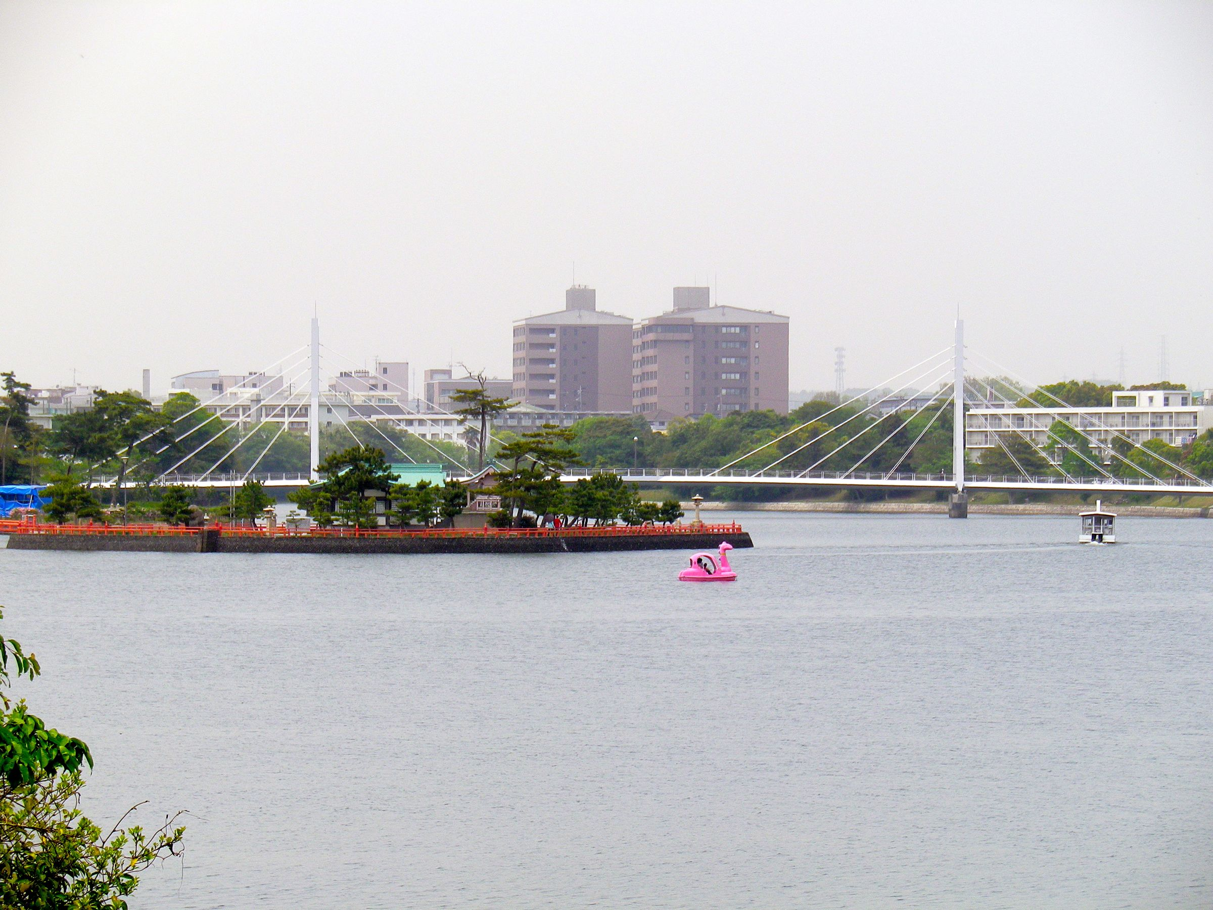 山口県宇部市。常盤公園内、常盤神社と白鳥大橋。奥の建物は山口大学工学部。2011年5月4日撮影。